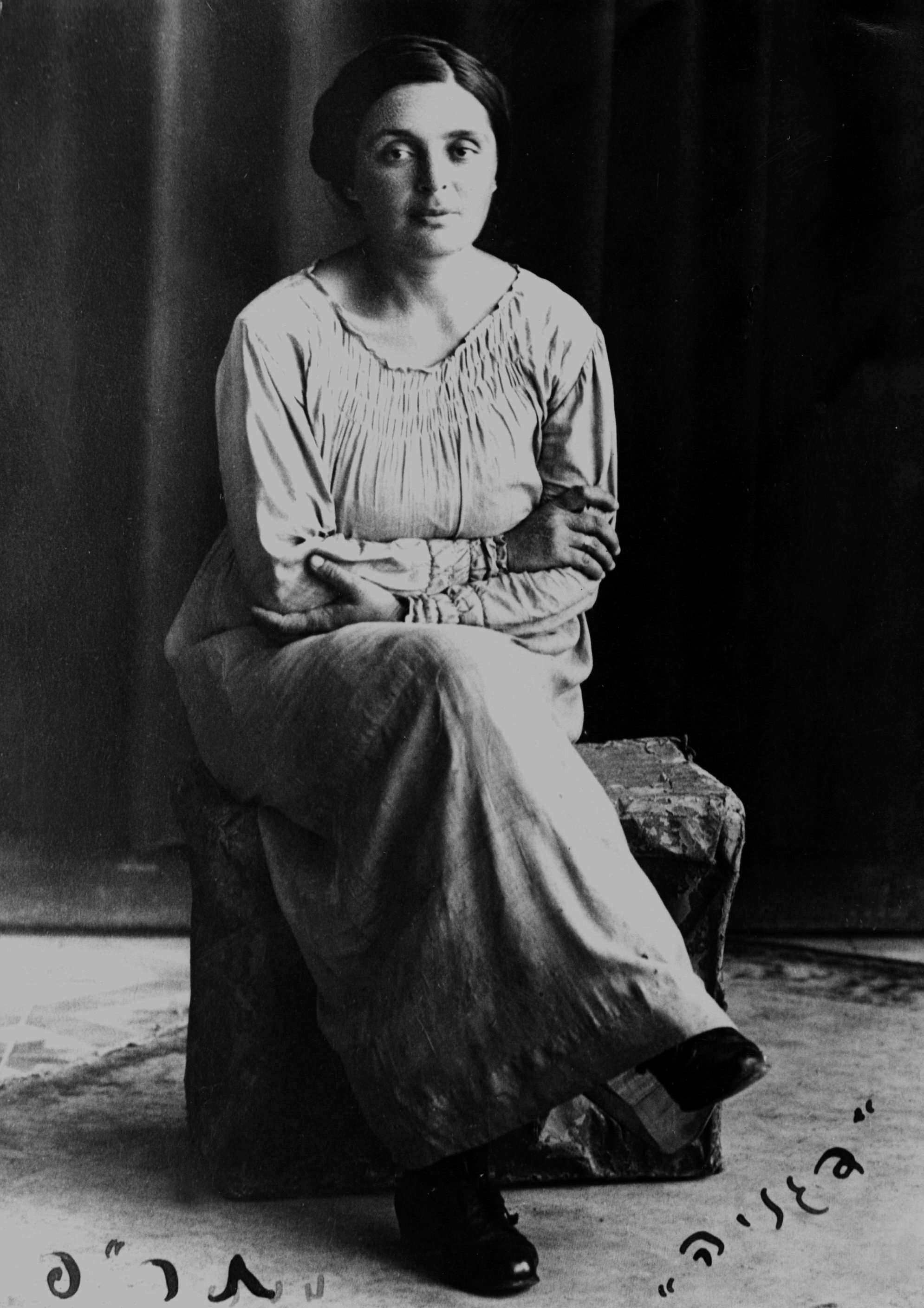 דבורה דייון הייתה חלוצה, אשת העלייה השנייה, ממייסדות קיבוץ דגניה א' ומושב נהלל